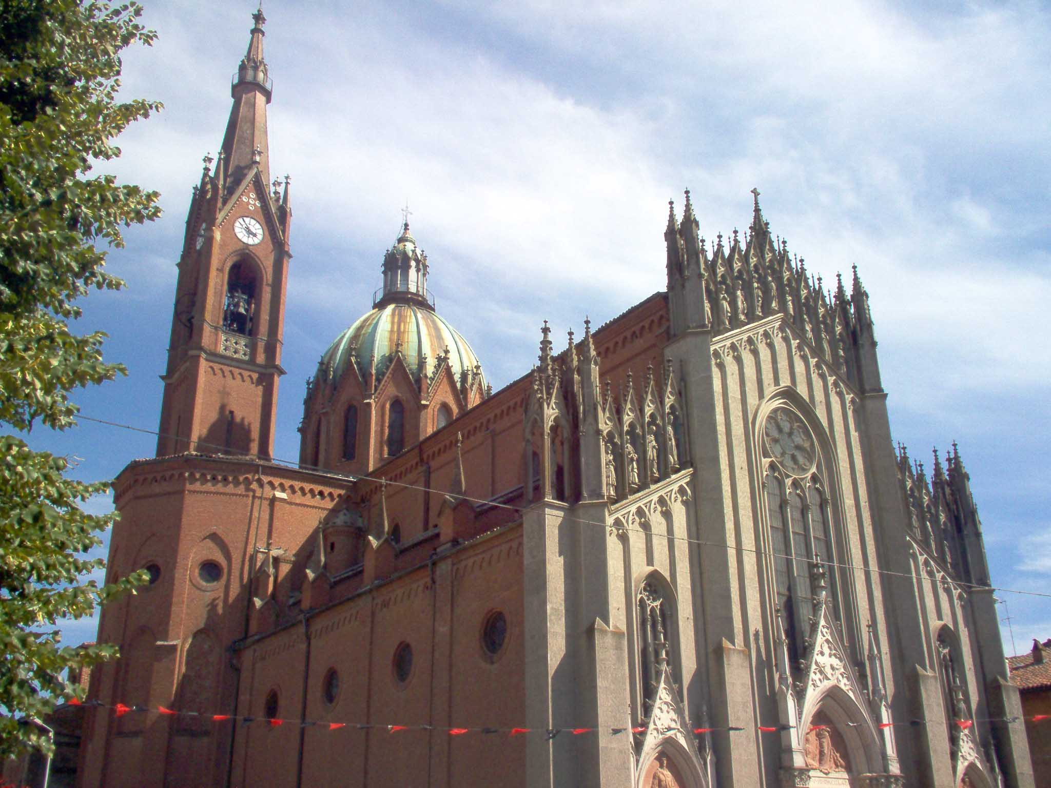 L'autore di questa foto è Riccardo Lelli, utente MessereRiccardo, che l'ha scattata personalmente e ne concede l'uso a Wikipedia per scopo didattico.